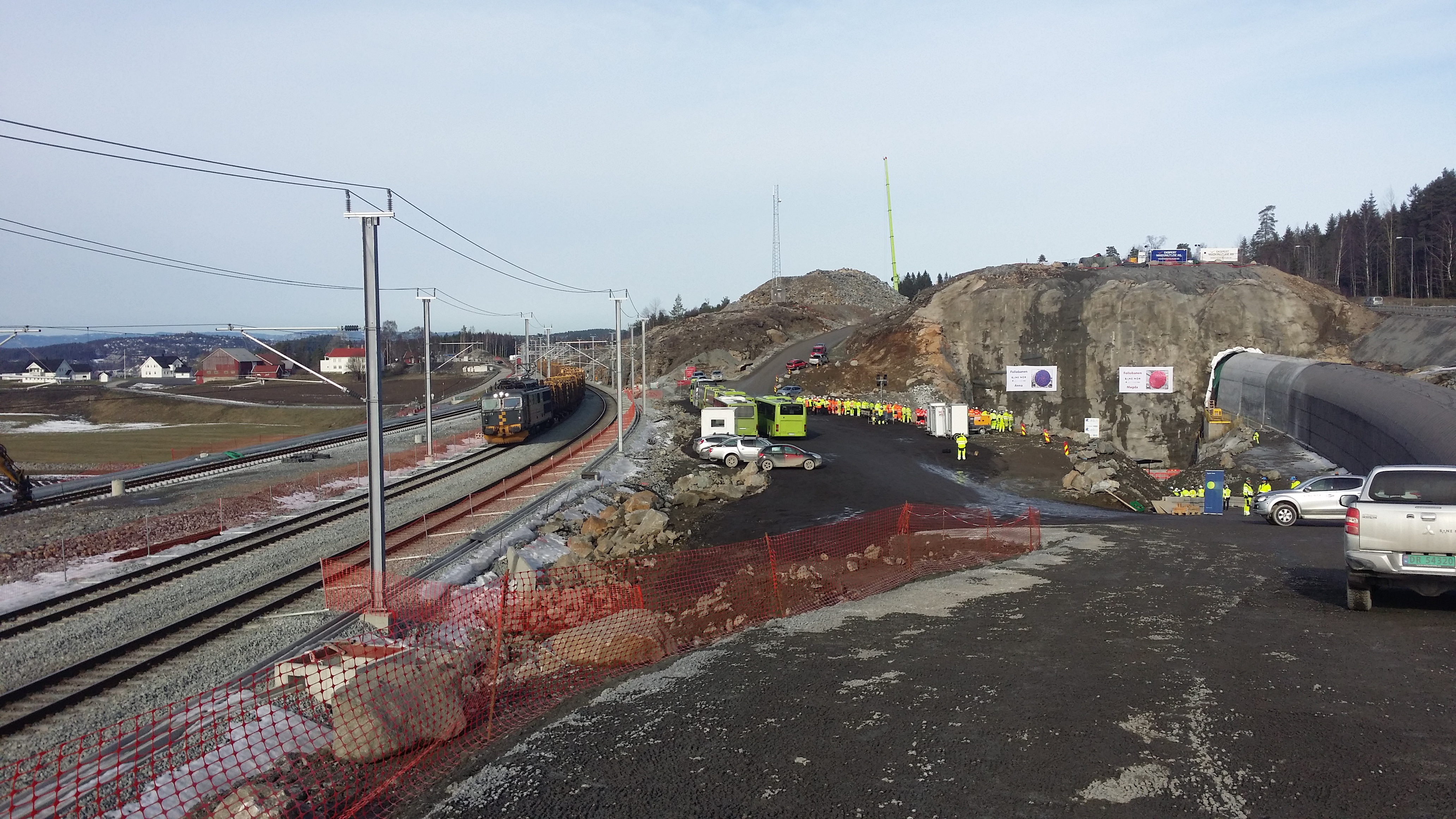 Gjennomslag for Blix-tunnelens to løp like nord for Ski.